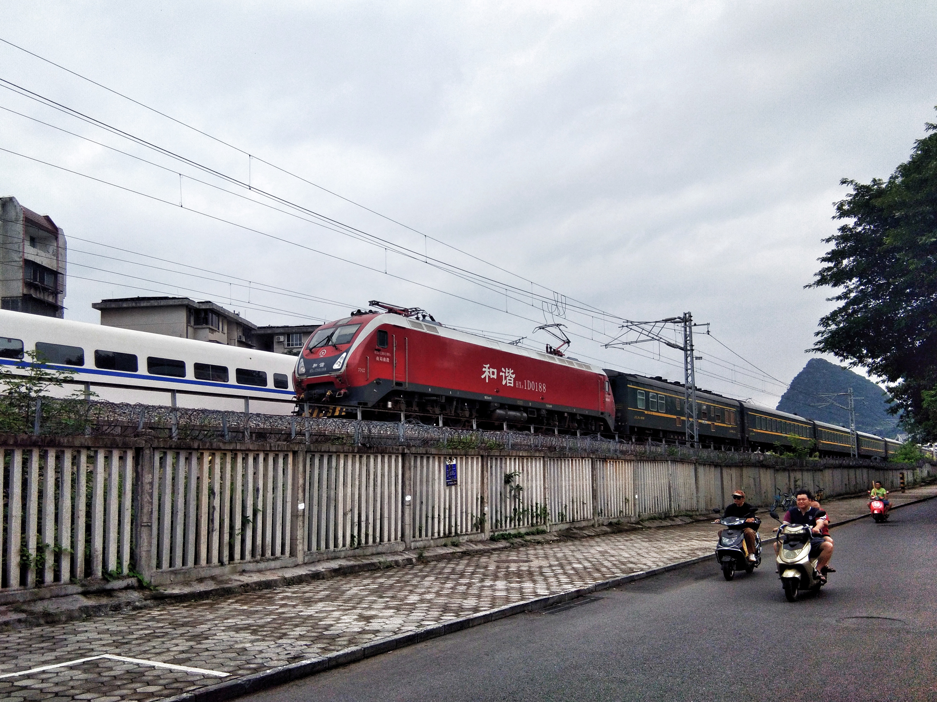 2018年7月2日，南昌铁路局南昌机务段0188号和谐1D型电力机车牵引K2385次列车通过桂林市九岗岭附近，此为该列车正数第一班使用该机务段机车担当交路。